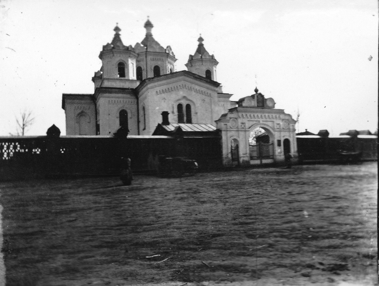 Беларуская (тарашкевіца): Хоцімск (Chocimsk), пляц Рынак (plac Rynak). Траецкая царква-мураўёўка